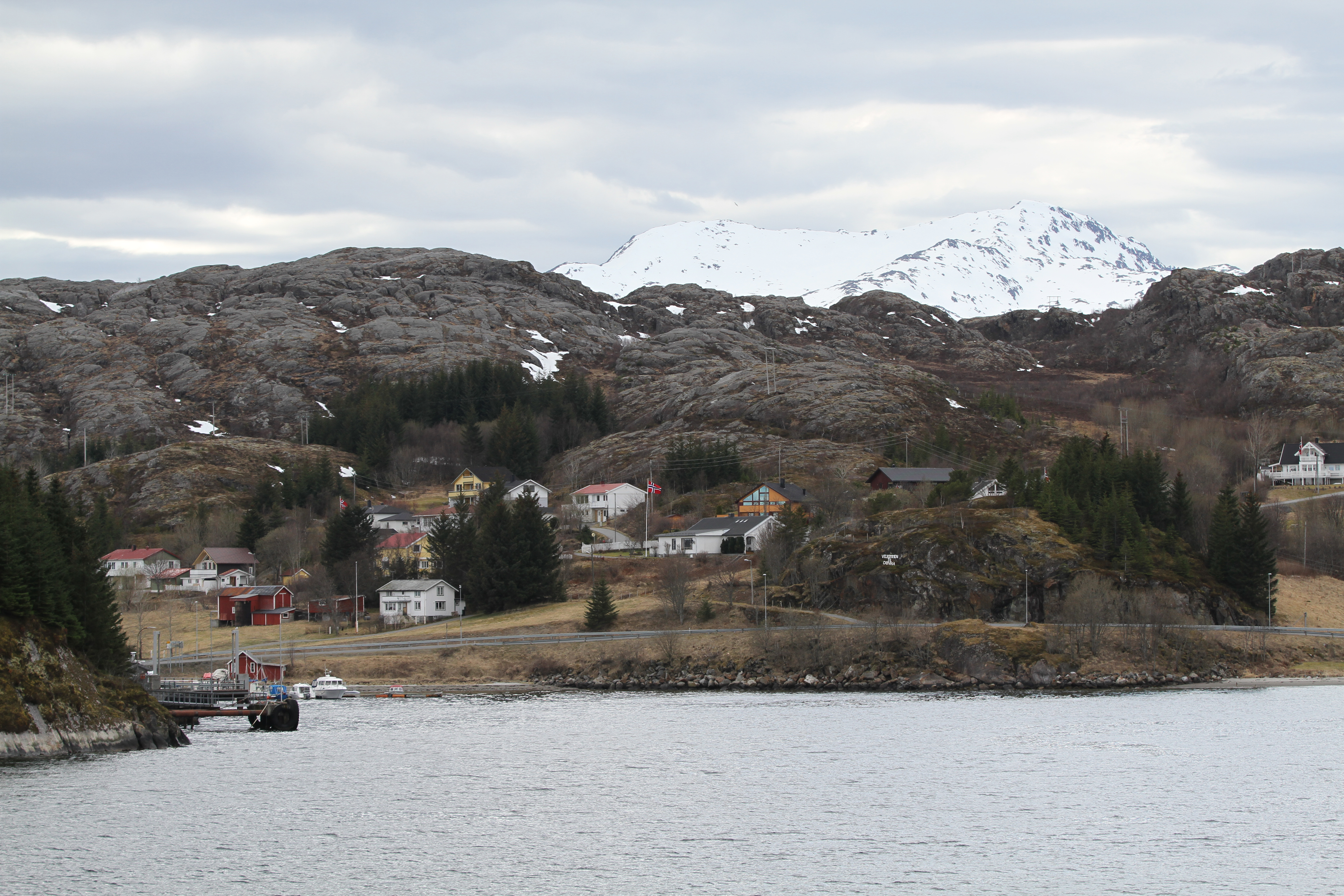 Bjørn